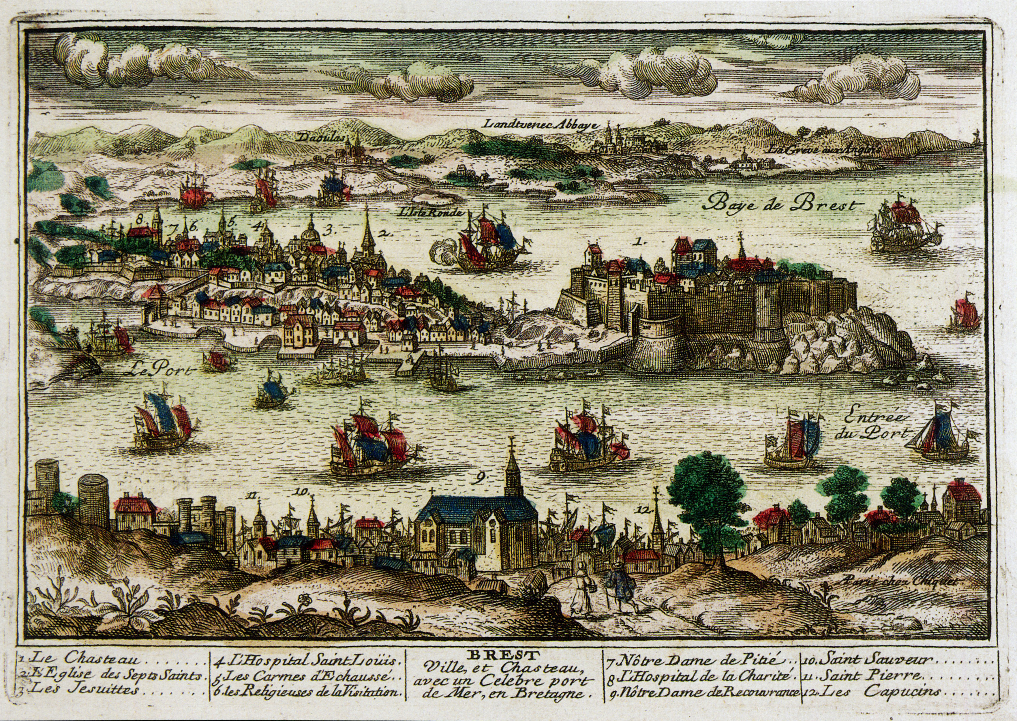 Vue cavalière de Brest, de la rade, de la Penfeld et de Recouvrance, Eau-forte 14x21,7